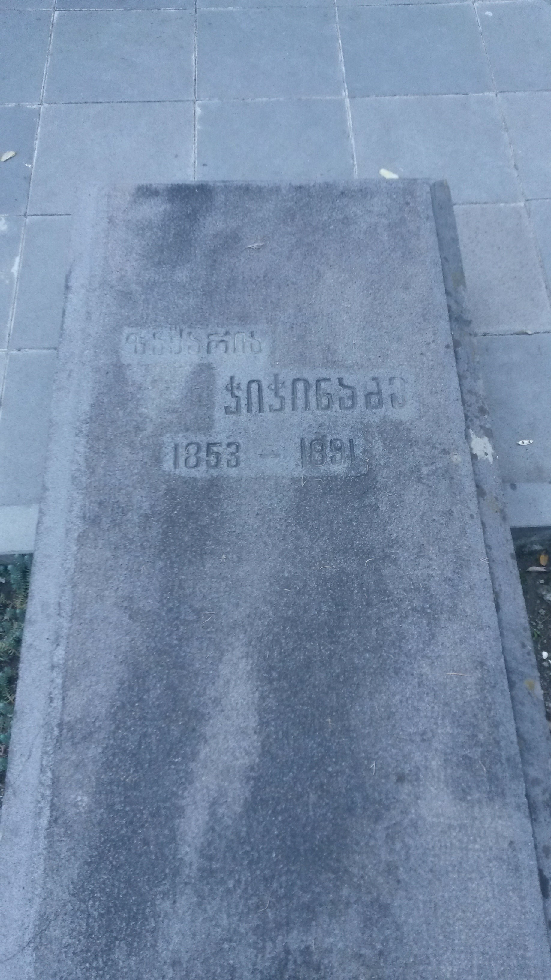 მთაწმინდის პანთეონი